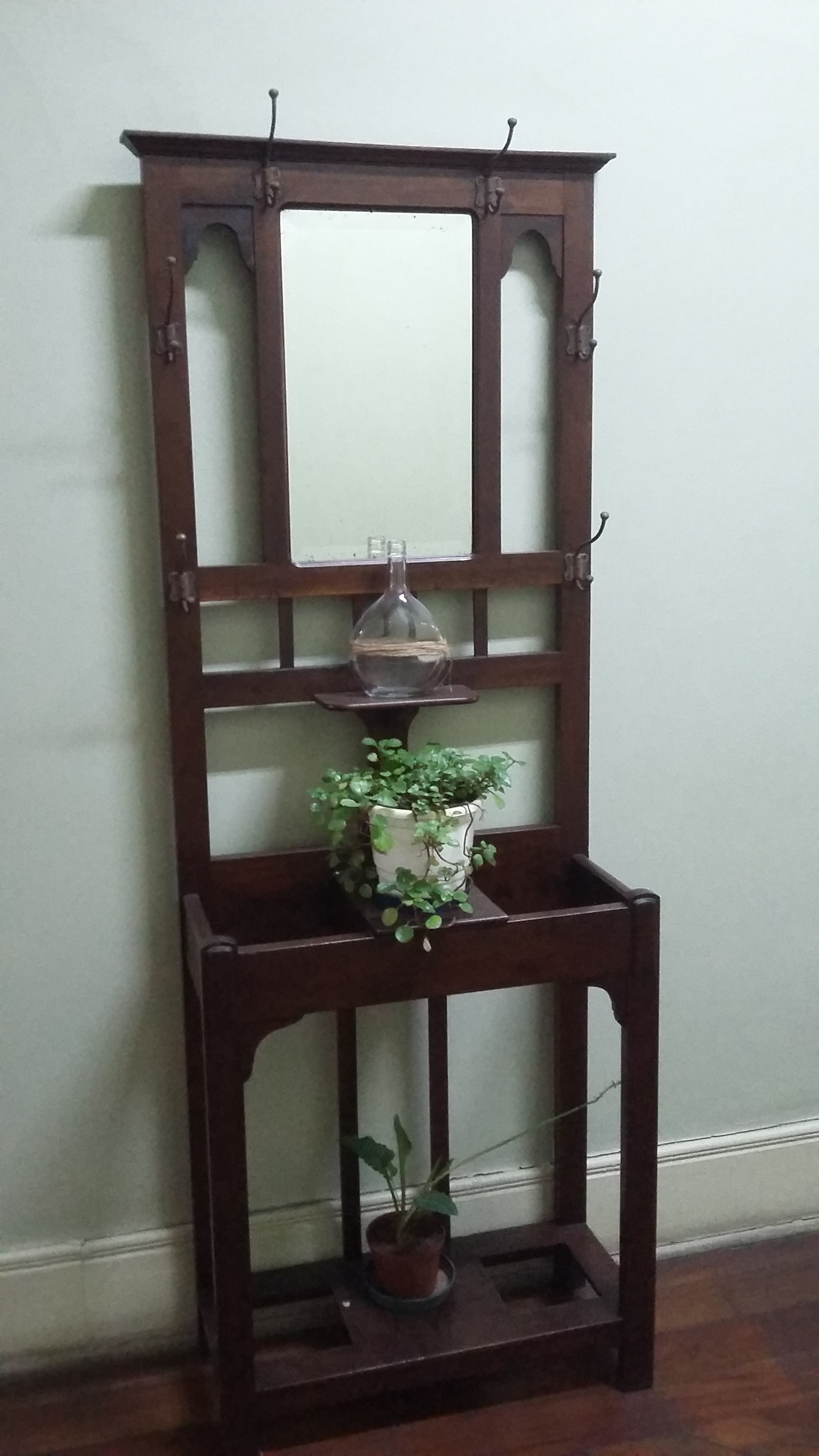 Móvel antigo da Escola Estadual Rodrigues Alves, em São Paulo (SP), Brasil.